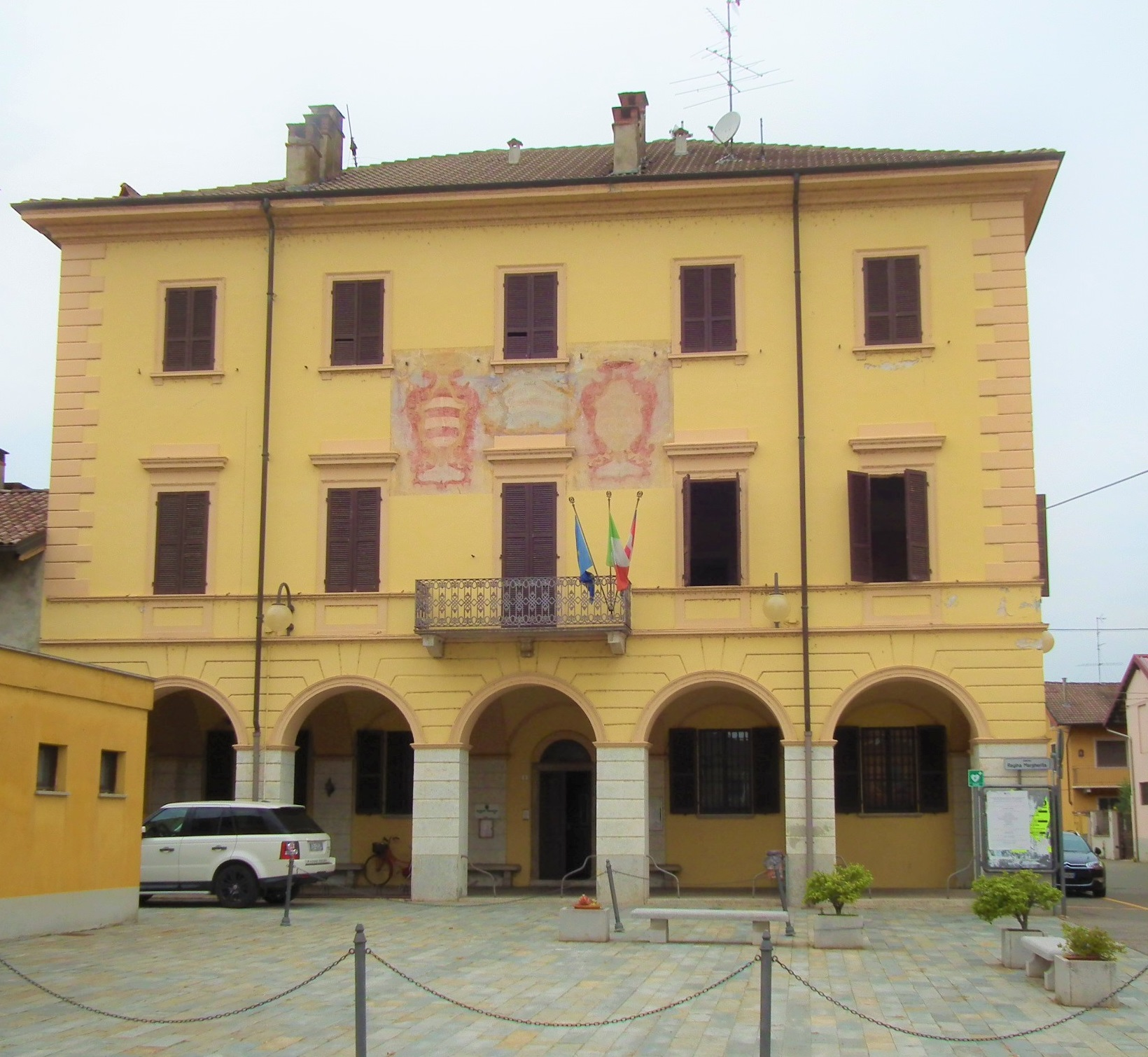 Edificio sede del Comune di Mandello Vitta localizzato nella piazza principale del paese.